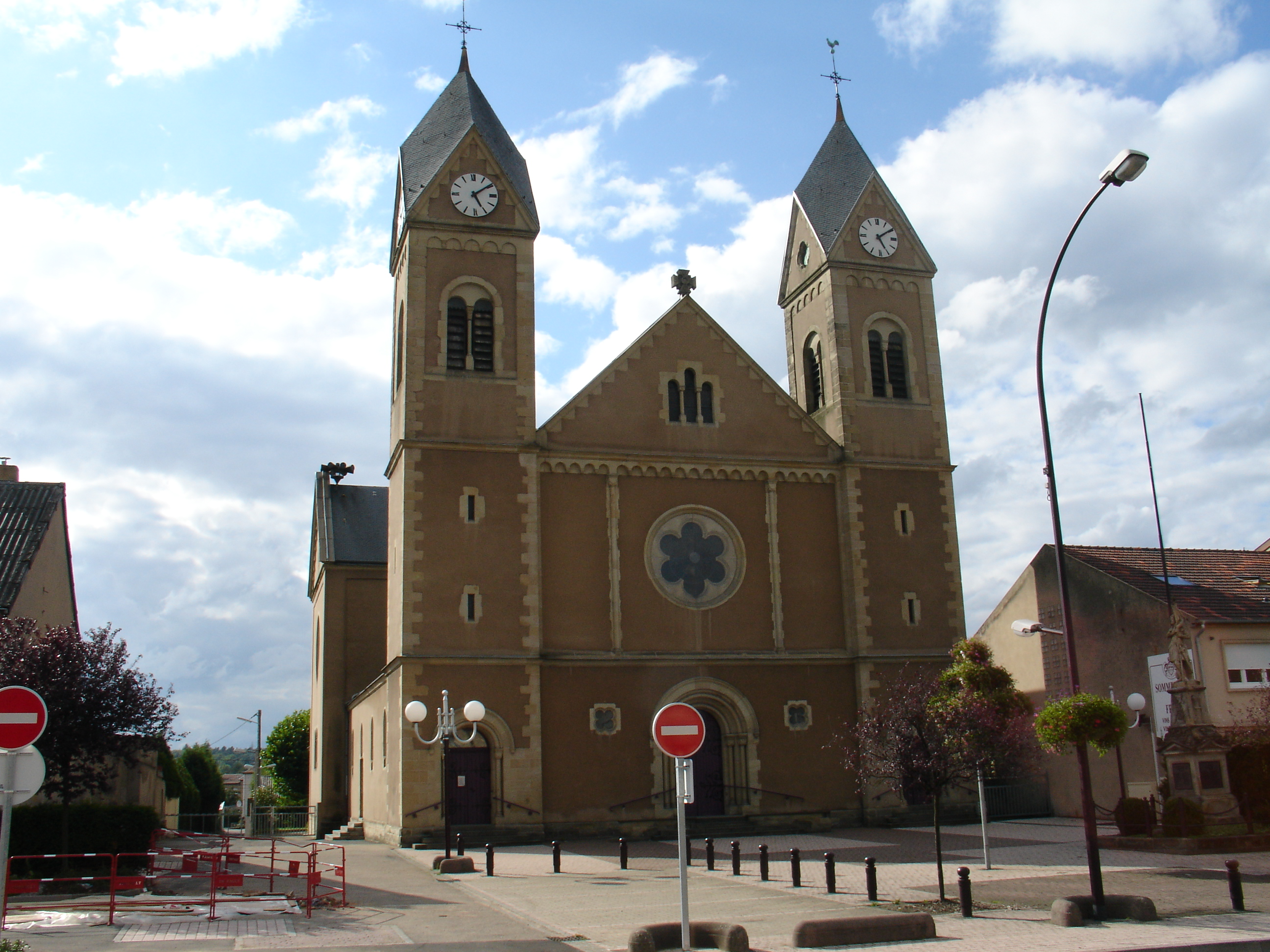 L'Église Saint-Gérard-Majella de Carling.